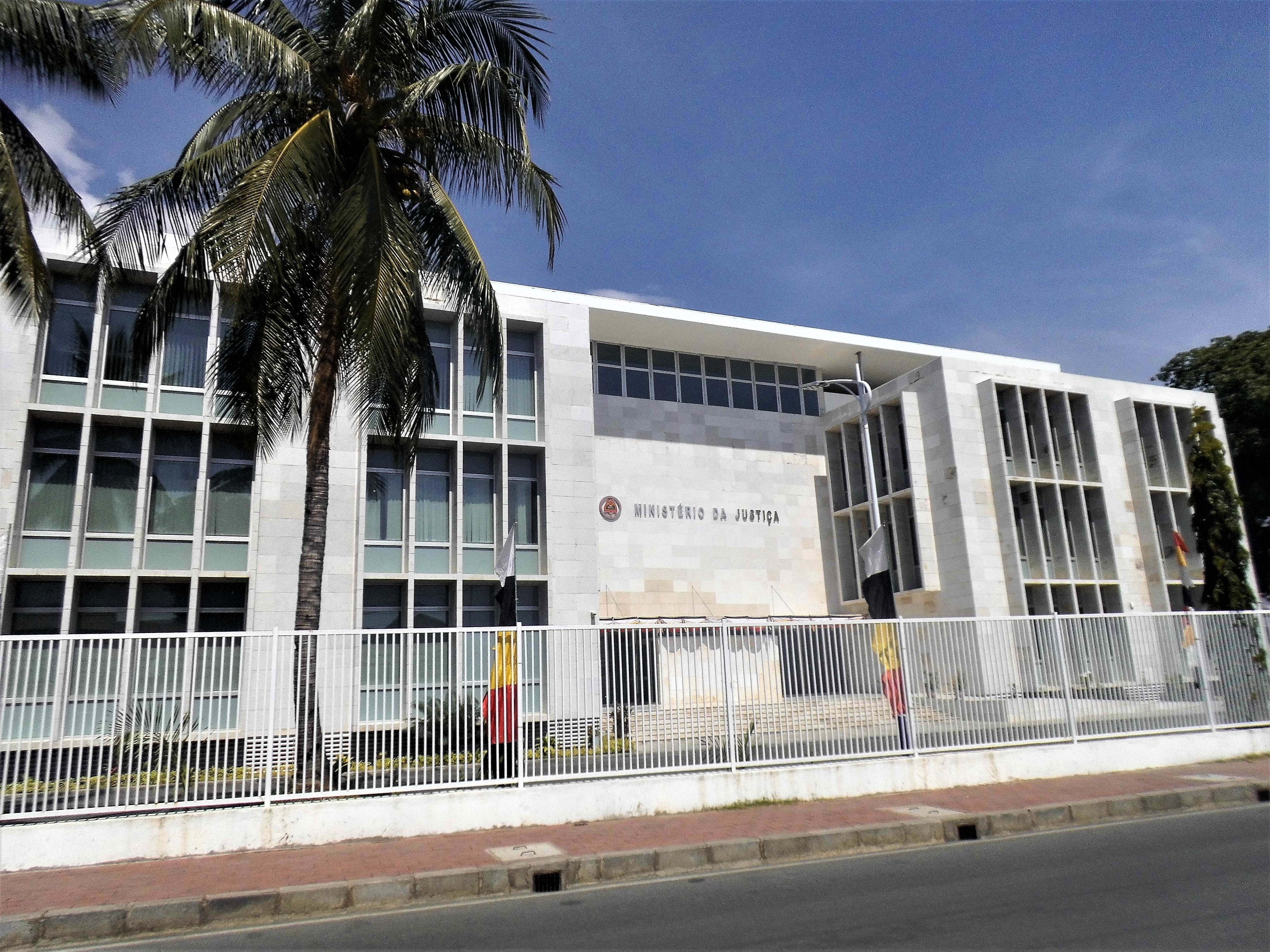 Ministerio da Justica